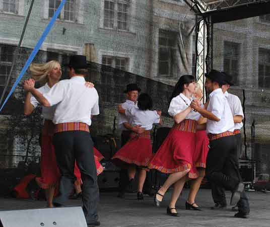 Tantsurühm Nii ja Naa esinemas Tallinna raekoja platsil sündmusel "Ava lava, Tallinn".